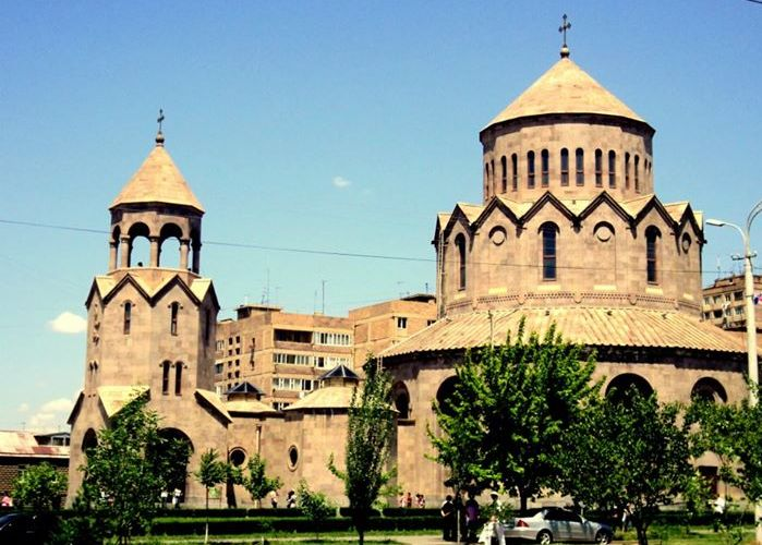 Սուրբ Երրորդություն եկեղեցի Գտնվում է Մալաթիա-Սեբաստիա համայնքում